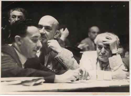 בקונגרס הציוני ה-21 (כ"א) 21st Zionist Congress. Moshe Sharett, Chaim Weizmann, David Ben-Gurion דוד בן-גוריון/ חיים וייצמן/ משה שרת ז'נבה 8